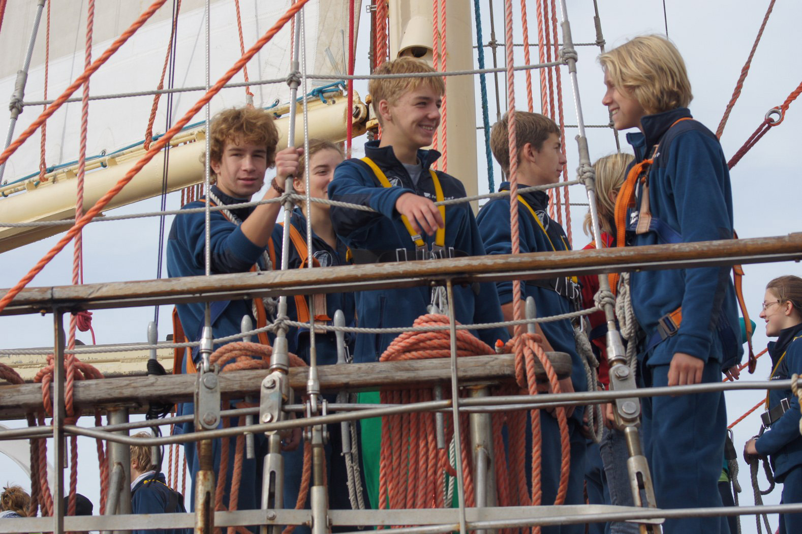 Szkoła pod Żaglami jesień 2012 - Pogoria wypływa ze Świnoujścia - pierwsza wachta uczniów.